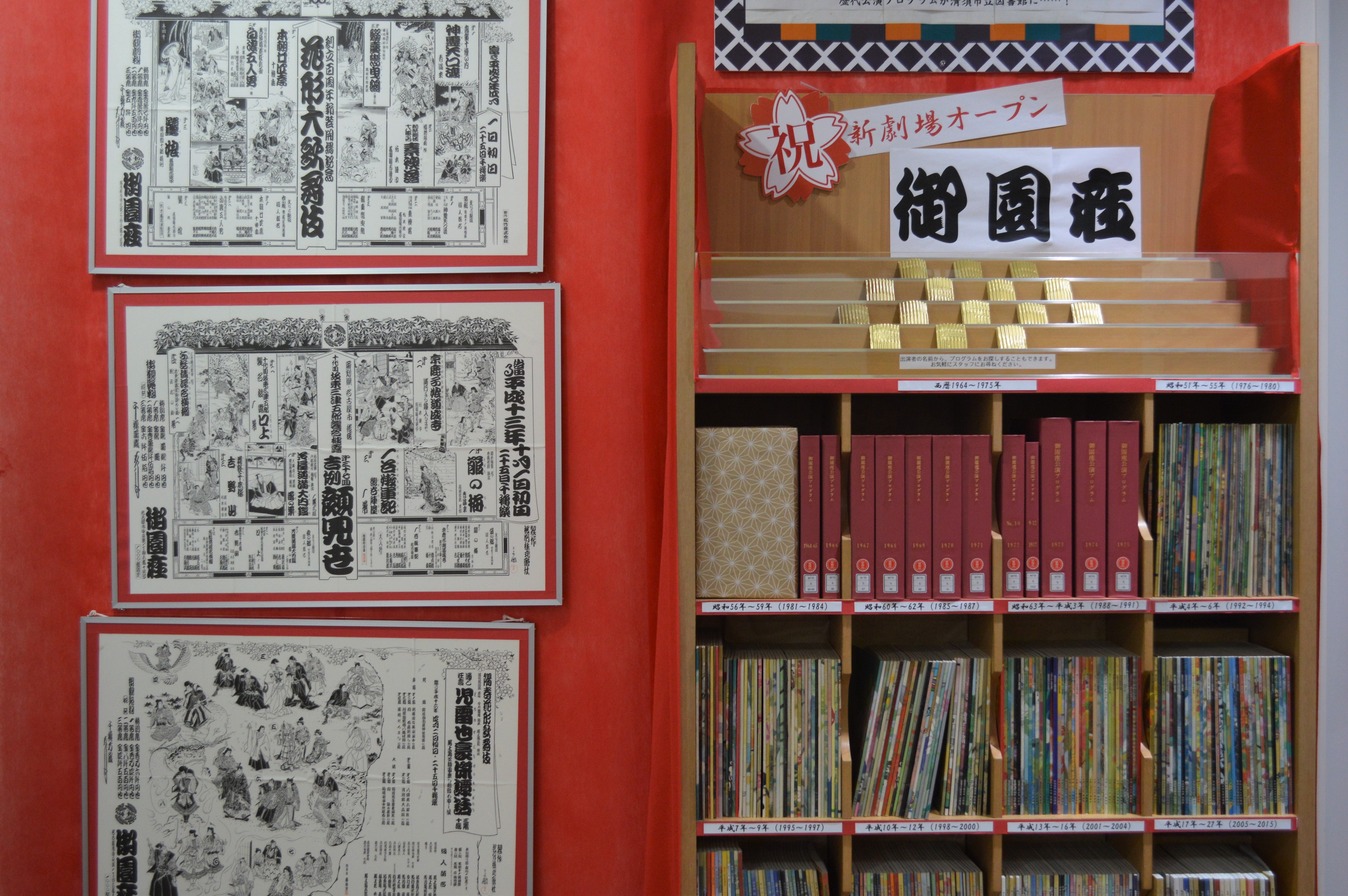 愛知県清須市の清須市立図書館。御園座のプログラム棚。